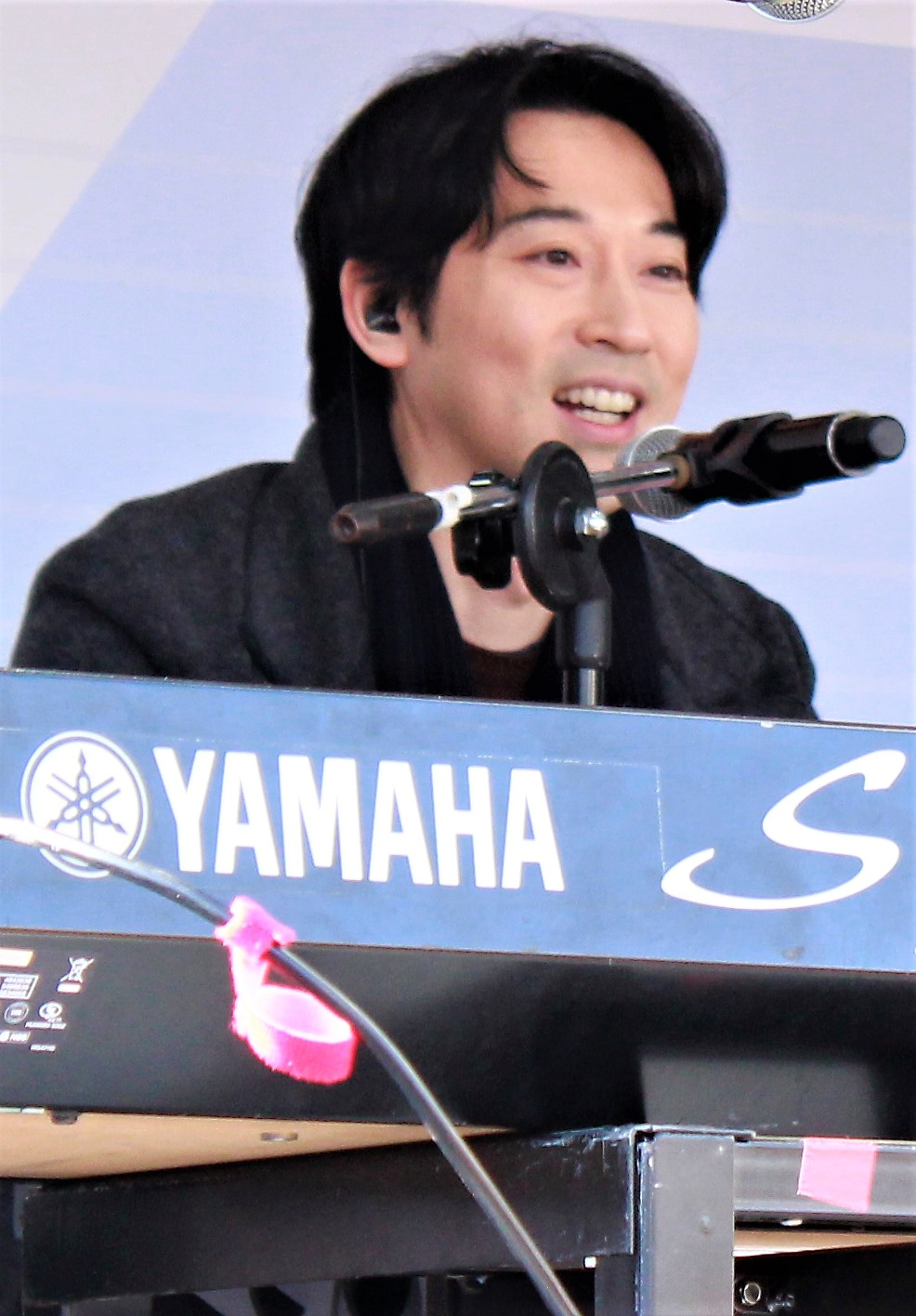 2017년 자신의 라디오 '골든 디스크'의 공개방송에서 이야기하는 이루마